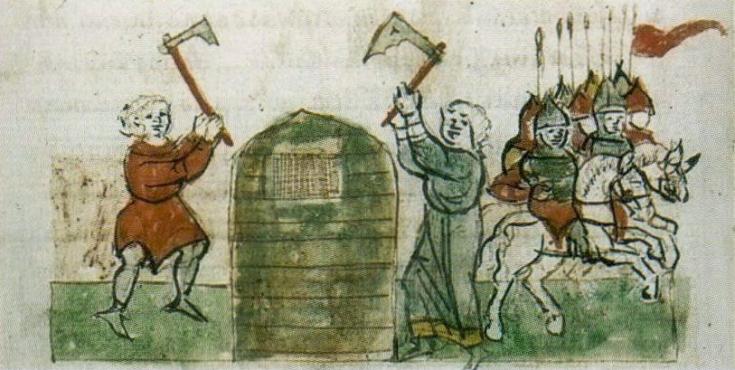 Кіяне вызваляюць Усяслава Брачыславіча з поруба. Мініяцюра Радзівілаўскага летапісу Беларуская (тарашкевіца): Мініятура Радзівілаўскага летапісу: Кіяне вызваляюць Усяслава Чарадзея зь Вязьніцы